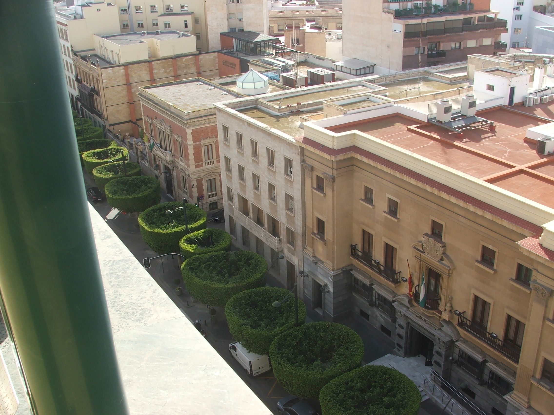 Fotografía del Paseo de Almería tomada desde el edificio de Unicaja hacia el sur. En primer término y de derecha a izquierda se distinguen la Delegación de Hacienda, la Estación experimental de zonas áridas (EEZA) y el Casino Cultural, ahora Delegación de Gobernación de la Junta de Andalucía.